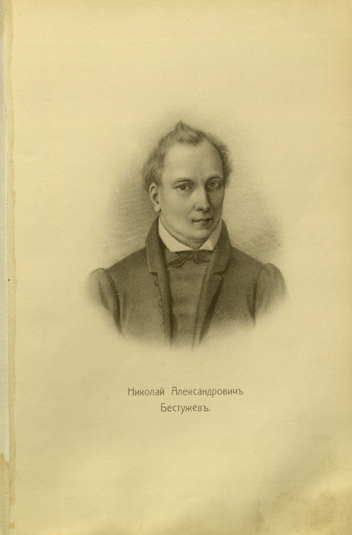 Головачев, П. М. Декабристы : 86 портретов, вид Петровского завода и 2 бытовых рисунка того времени. - М., [1906] Nikolay Bestuzhev